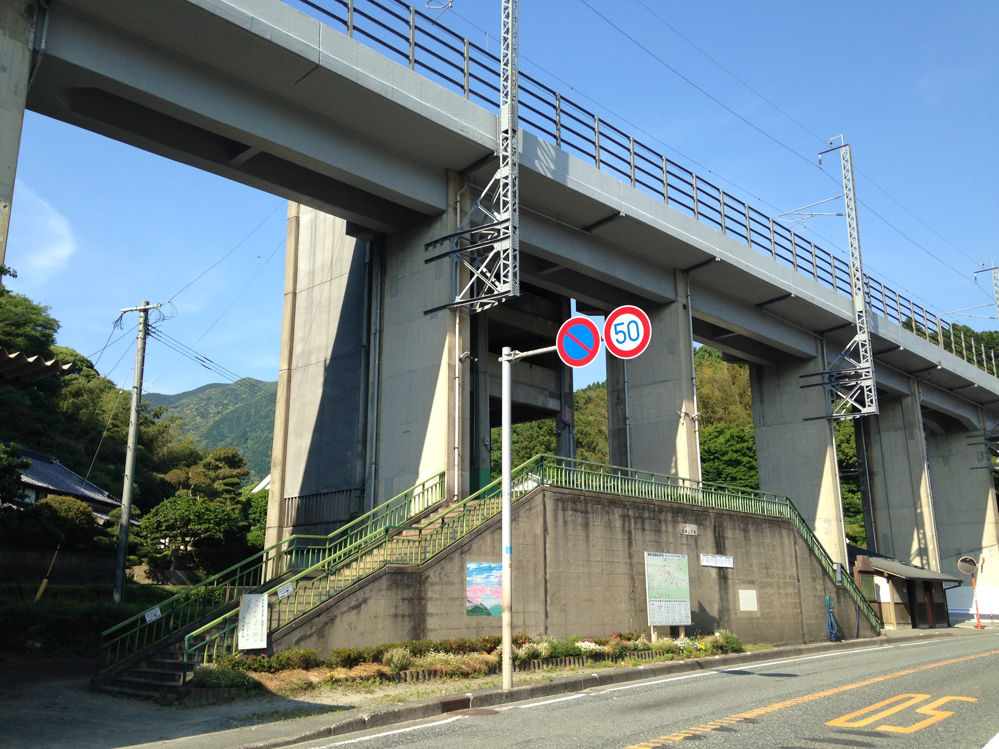 筑前山手駅駅舎